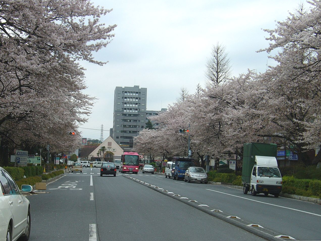 大学通りの桜並木越しに国立駅を望む